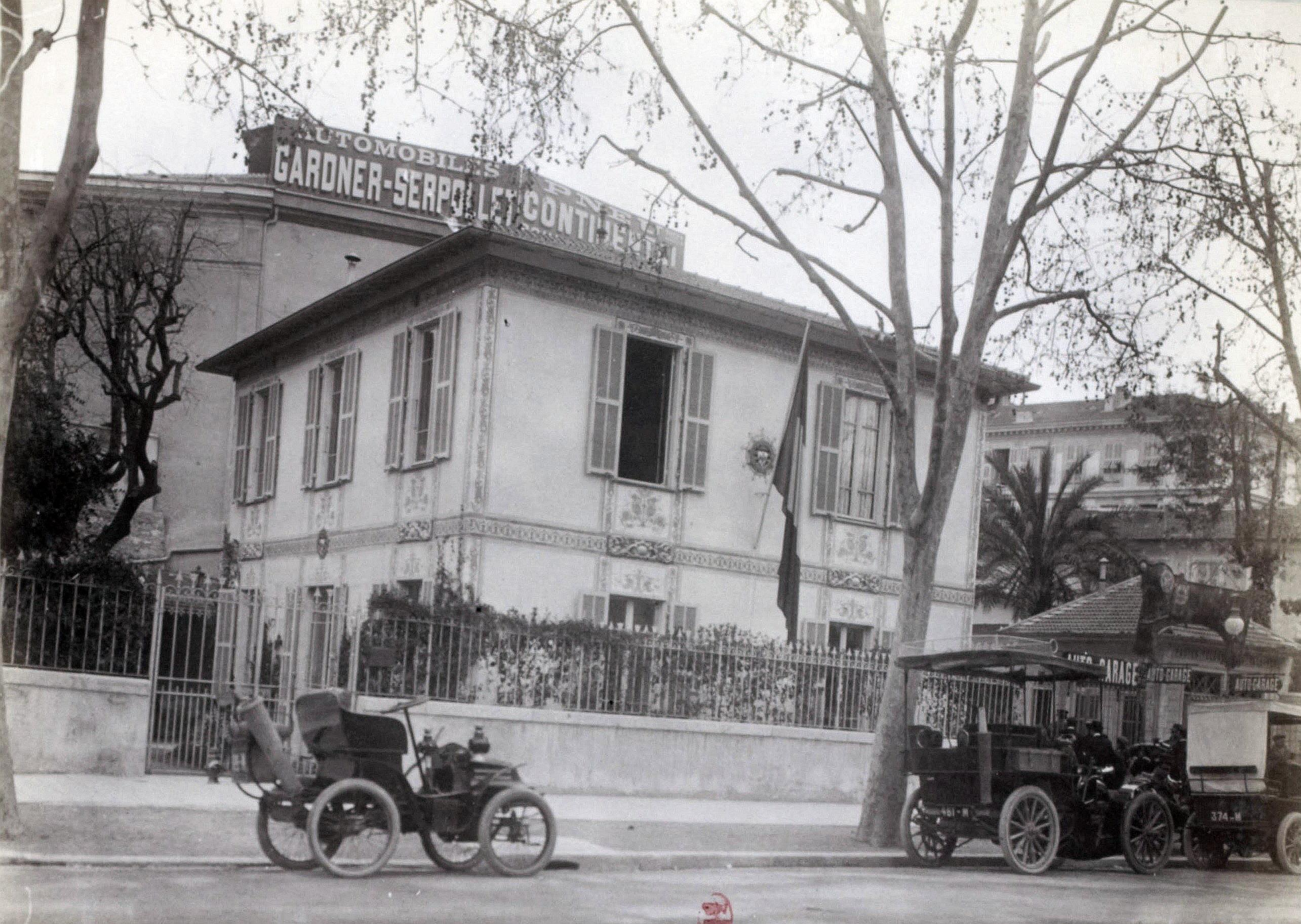 [Collection Jules Beau. Photographie sportive] : T. 20. Année 1903 / Jules Beau : F. 36. Quinzaine de Nice, Concours de tourisme, 30 mars 1903 ; Automobile Club de Nice